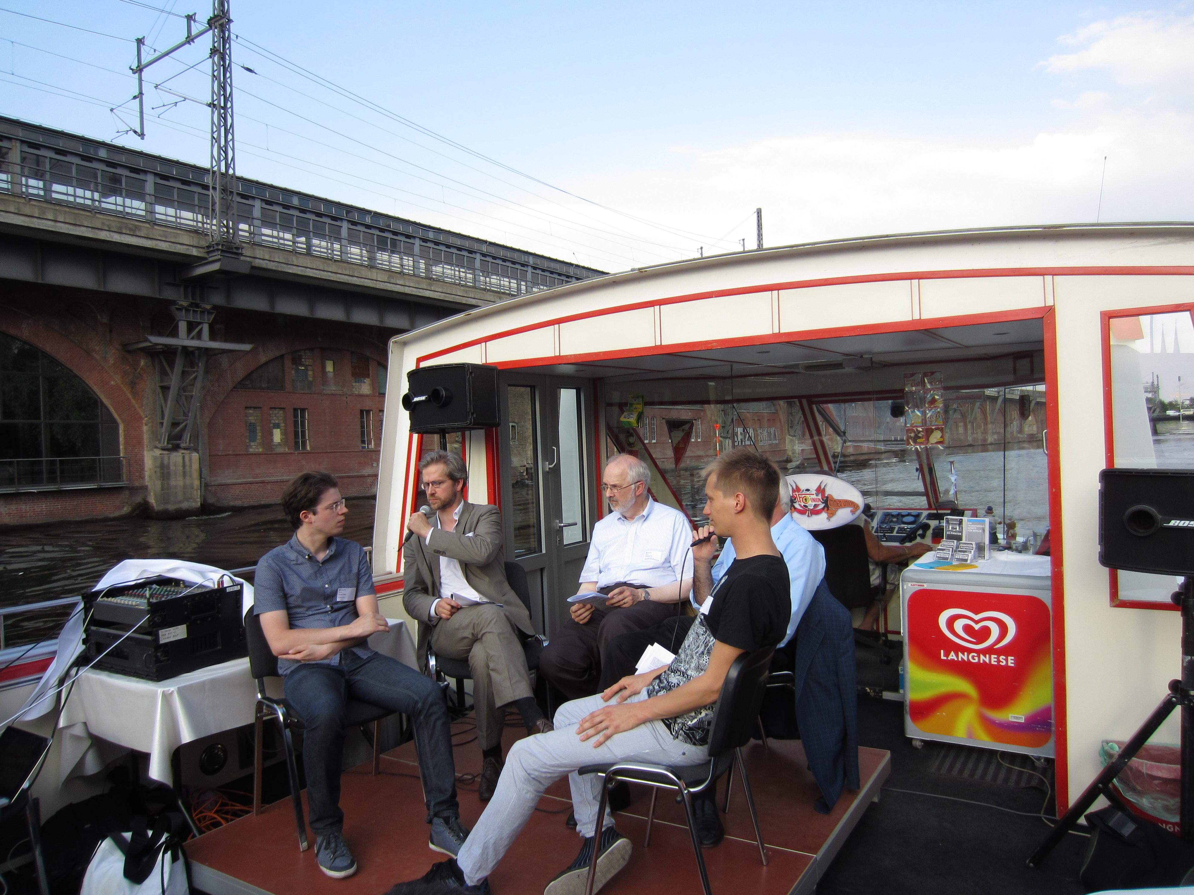 Von links: Simon Weiß (MdA Berlin, Piratenpartei), Jan Thomsen (Berliner Zeitung) und Alexander Dix (Datenschutzbeauftragter Berlin) bei einer Veranstaltung der Piratenpartei zu einem möglichen Transparenzgesetz in Berlin.